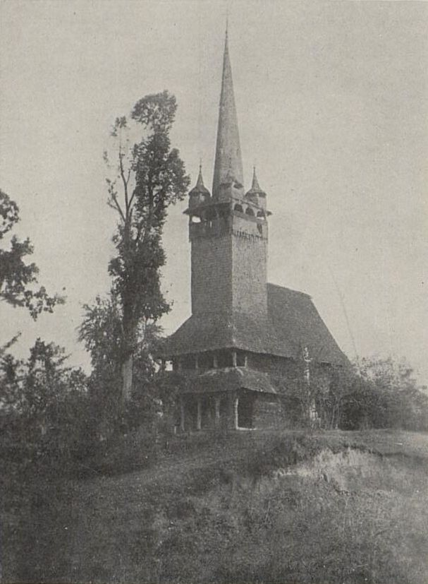 Dřevěný kostel ještě před přesunem v Nižním Selišti